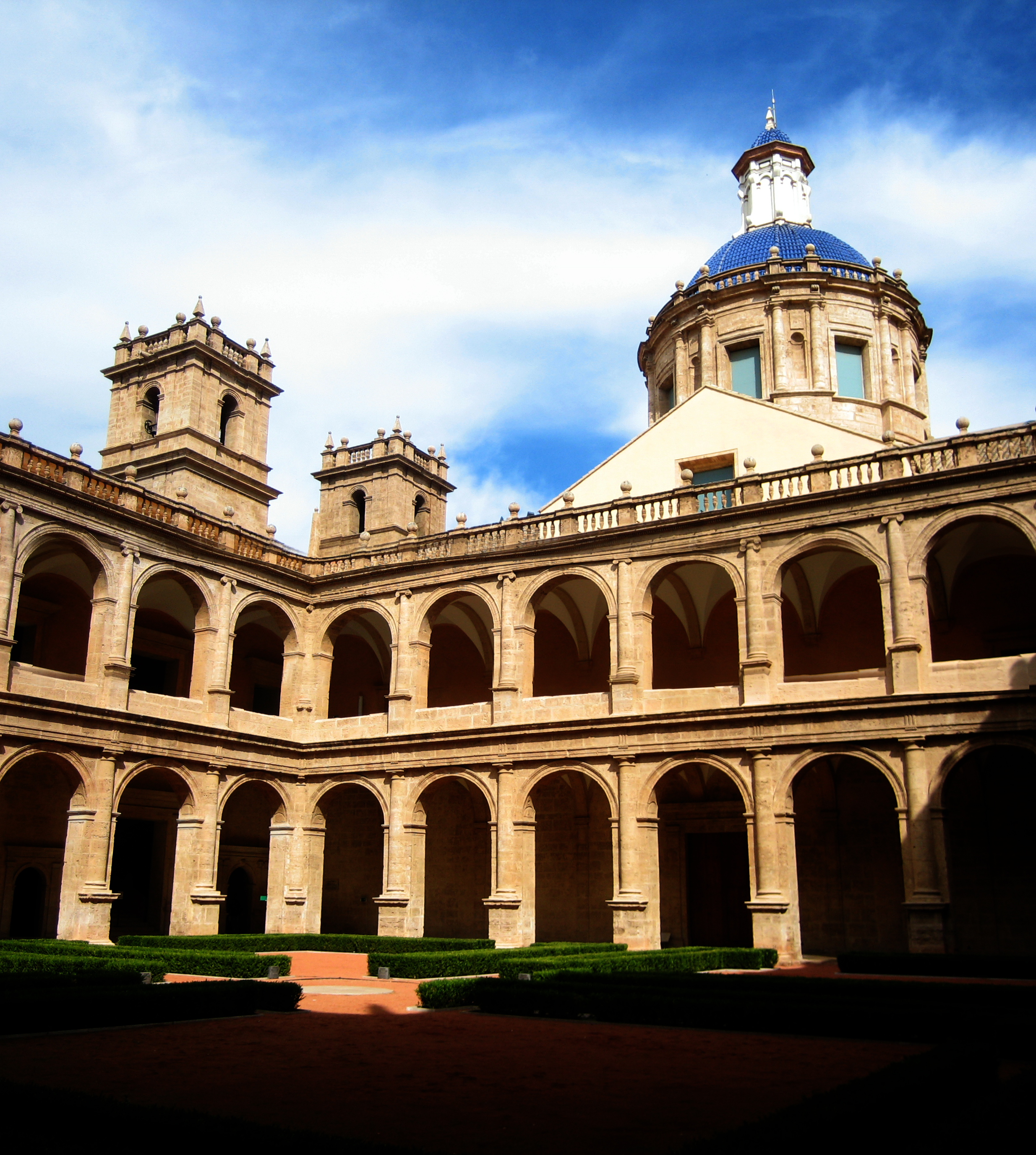 Monasterio de San Miguel de los Reyes (Valencia)